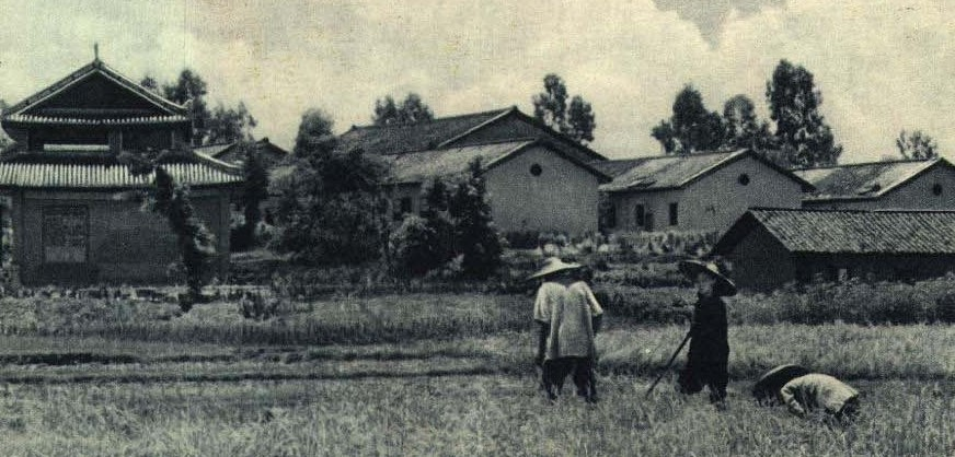 1962-05 1962年 客家兴宁 横湖新村